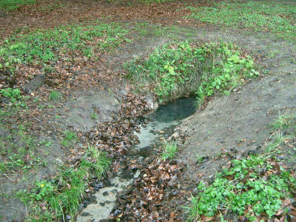 Quelle im Raben Steinfelder Forst am Pinnower See im Landkreis Parchim (Mecklenburg).